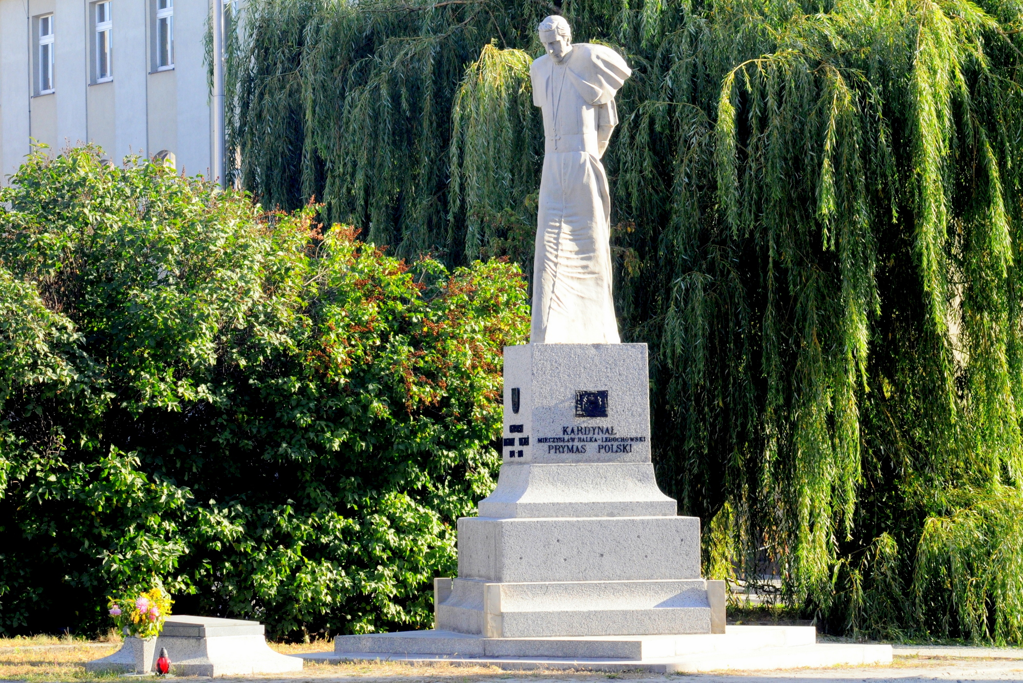 Ostrów Wlkp., ul. kard. M. Ledóchowskiego. Pomnik kardynała i prymasa Polski Mieczysława Halki-Ledóchowskiego ostrowianie ufundowali w 1925 r., upamiętniając Jego uwięzienie przez prusaków w leżącym nieopodal więzieniu. Pomnik wykonał Władysław Marcinkowski. Monument ten zniszczyli w 1939 r. najeźdźcy niemieccy, a w 1984 r. zrekonstruowała go prof. Łucja Skomorowska-Wilimowska.